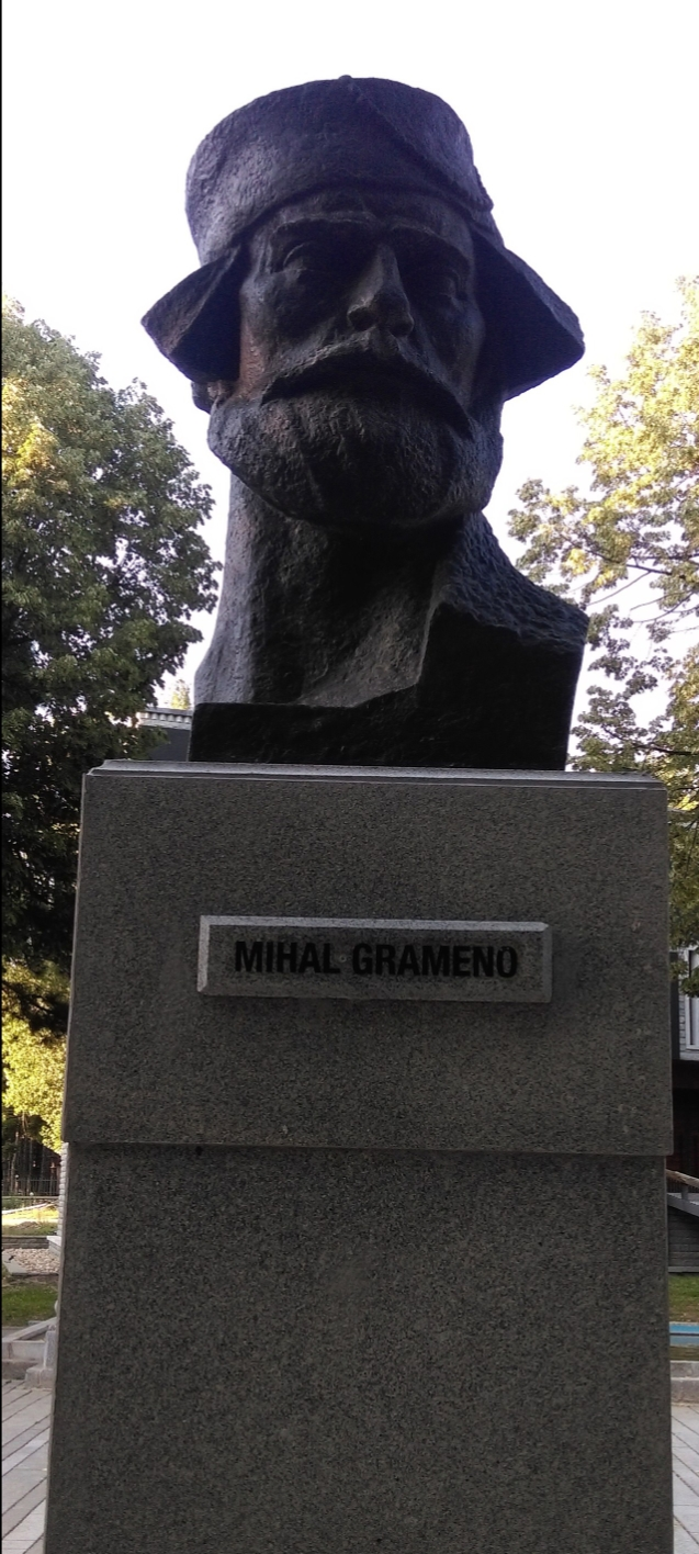 Mihal Grameno Büstü